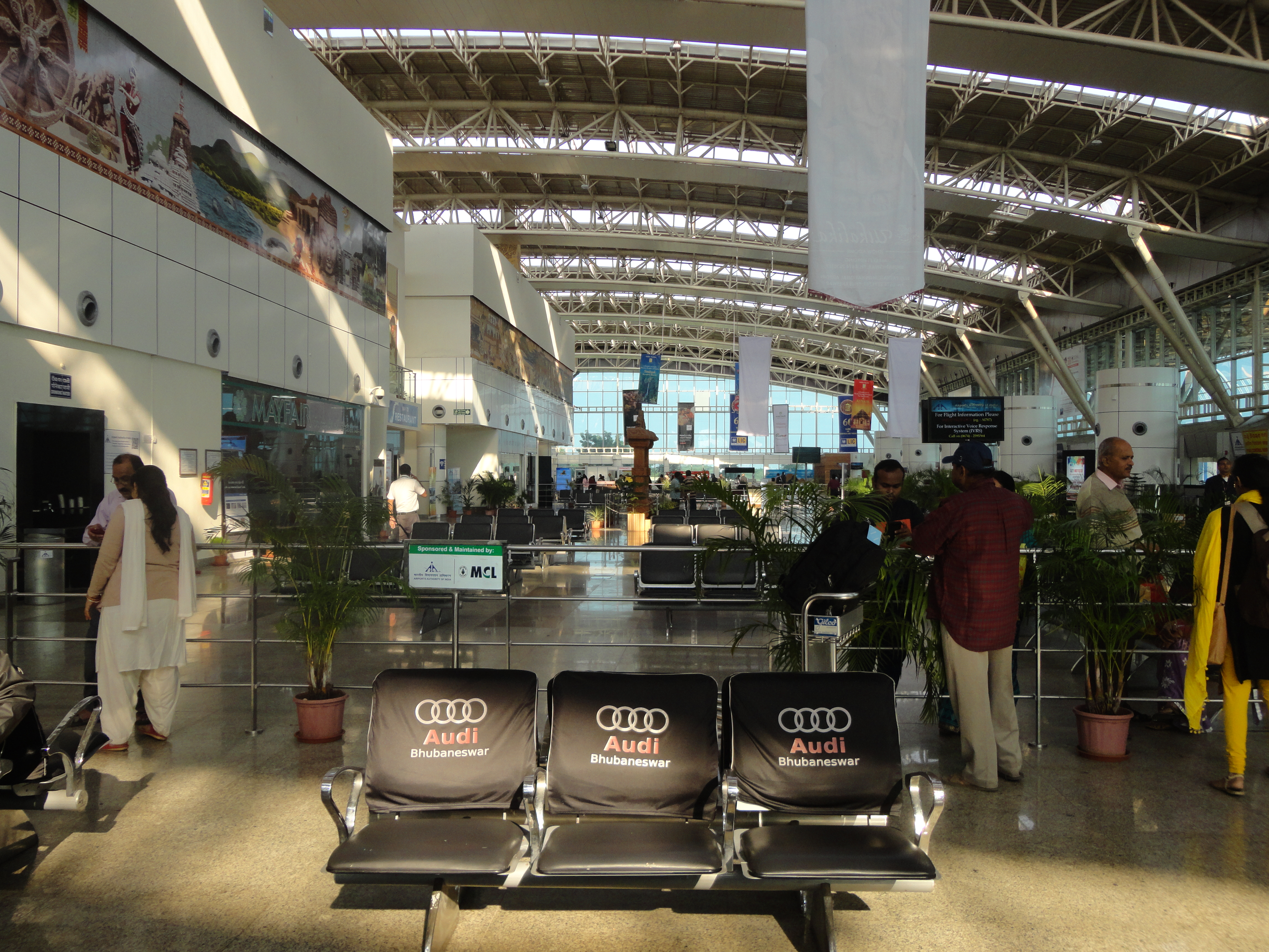 ଓଡ଼ିଆ: ବିଜୁ ପଟ୍ଟନାୟକ ଆନ୍ତର୍ଜାତିକ ବିମାନବନ୍ଦର ର ଅପେକ୍ଷ୍ୟା ପ୍ରକୋଷ୍ଠ